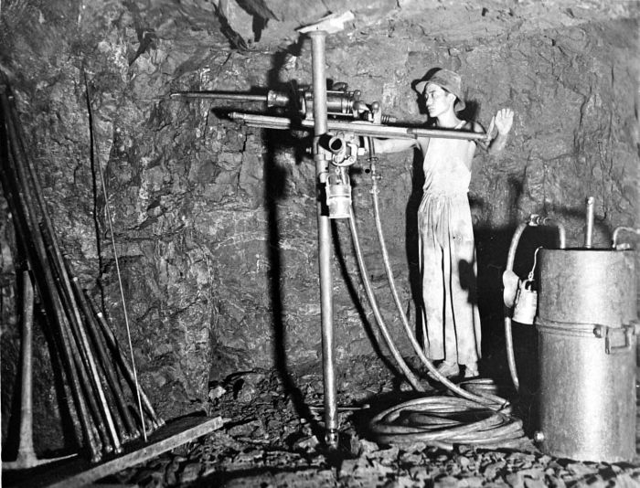 Repronegatief. Een mijnwerker met boormachine in een mijnschacht, Raja